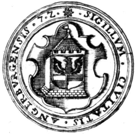 Większa pieczęć Węgorzewa według: Ludwig Reinhold von Werner, 'Paleographiae patriae de oppido Angerburg eiusque sigillo; d.i. Historische Nachricht von der Stadt Angerburg und derselben Wappen, Specimen 2, Königsberg 1751 (Biblioteka Uniwersytecka w Toruniu, sygnatura 265295)